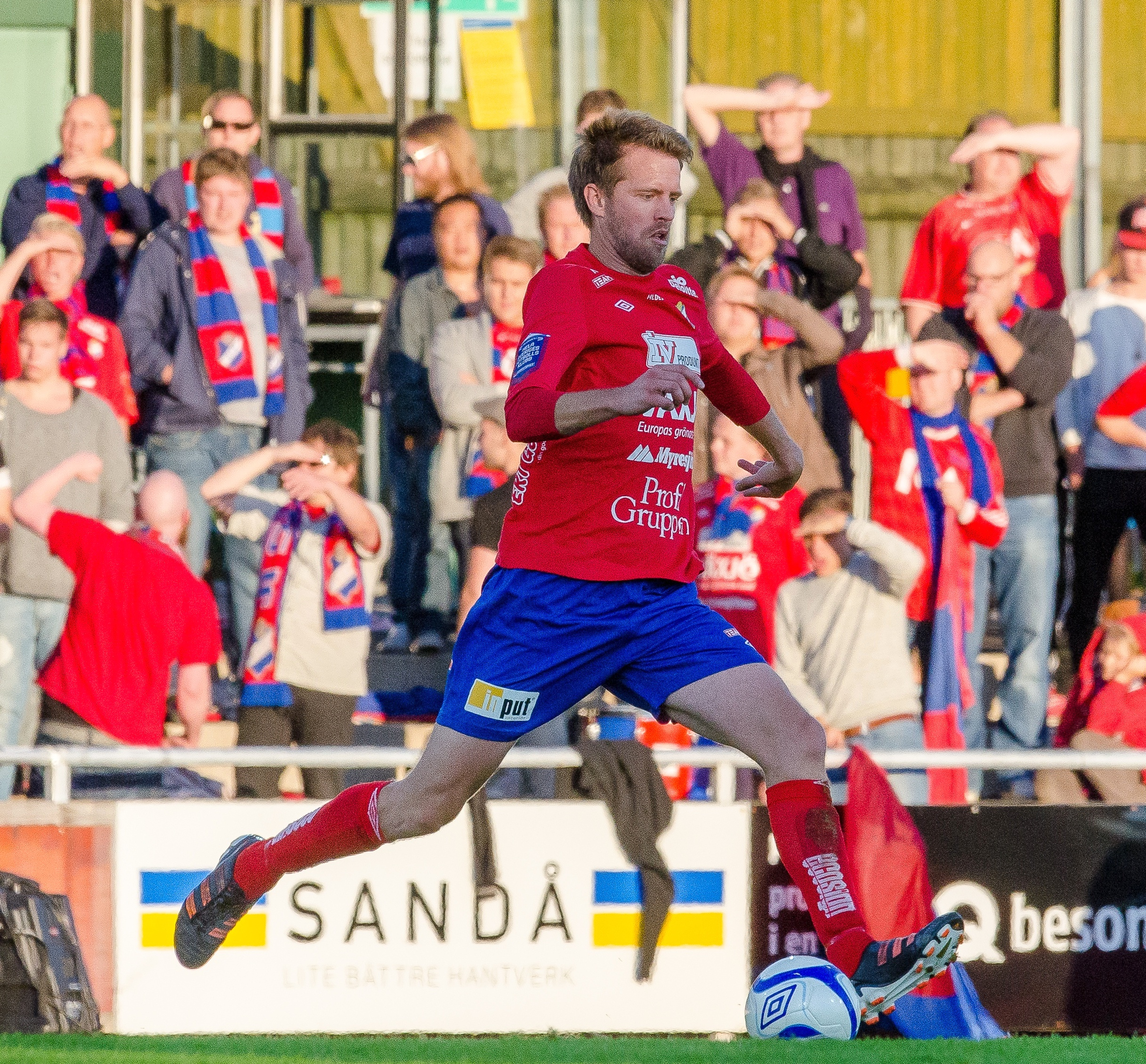 Den svenske mittbacken Joachim Lantz gör comeback i elitfotbollen när hans nya lag Öster bortaslår Vatbergs BoIS, 27 augusti 2012.